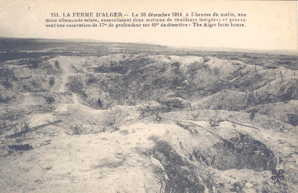 Pendant la Première Guerre Mondiale, le 30 décembre 1914, une mine explose sous la position de la Ferme d'Alger occupée par des soldats tunisiens du 4e Régiment de Tirailleurs Tunisiens (4e RTT) tuant plusieurs soldats